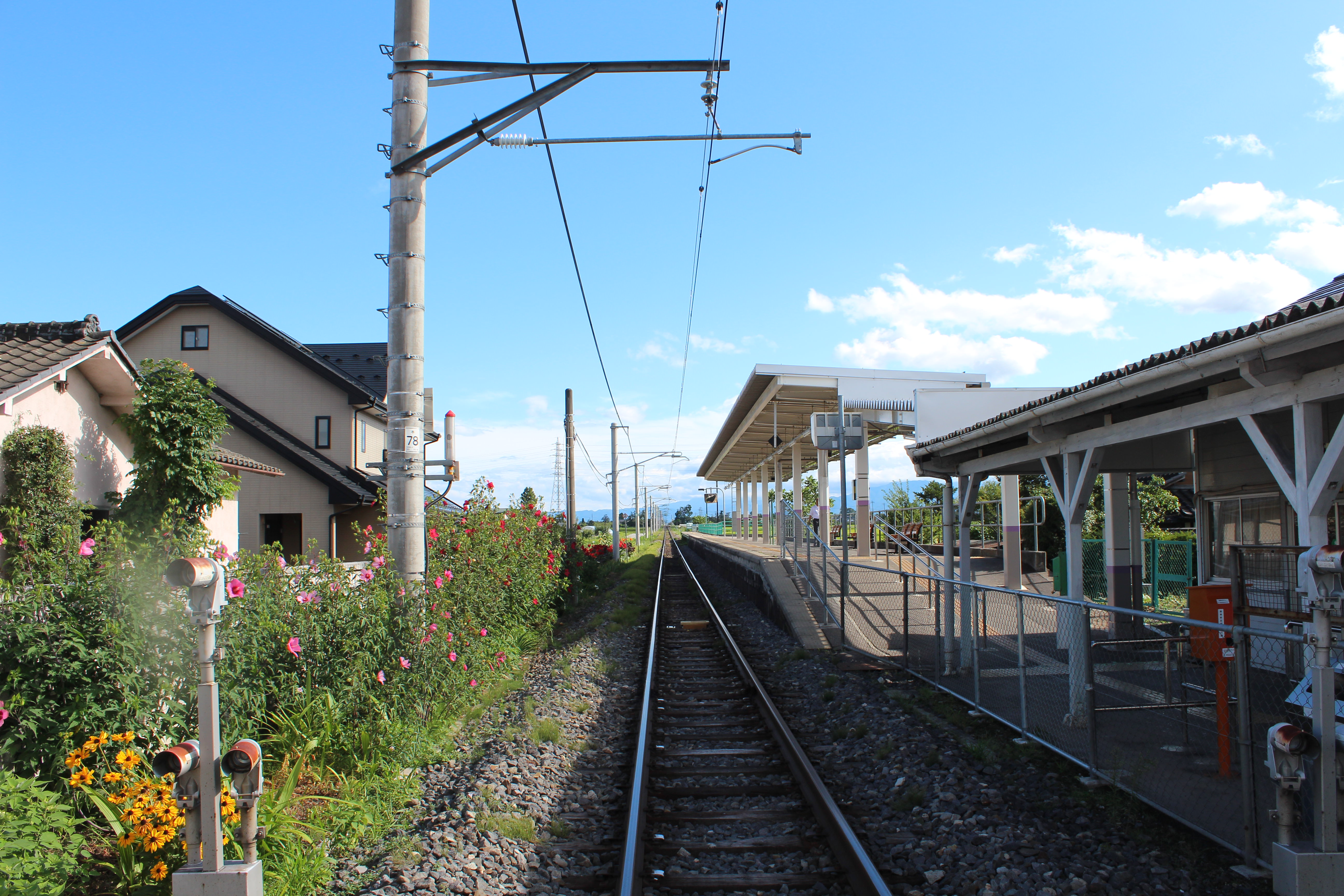 南豊科駅ホーム・線路外観